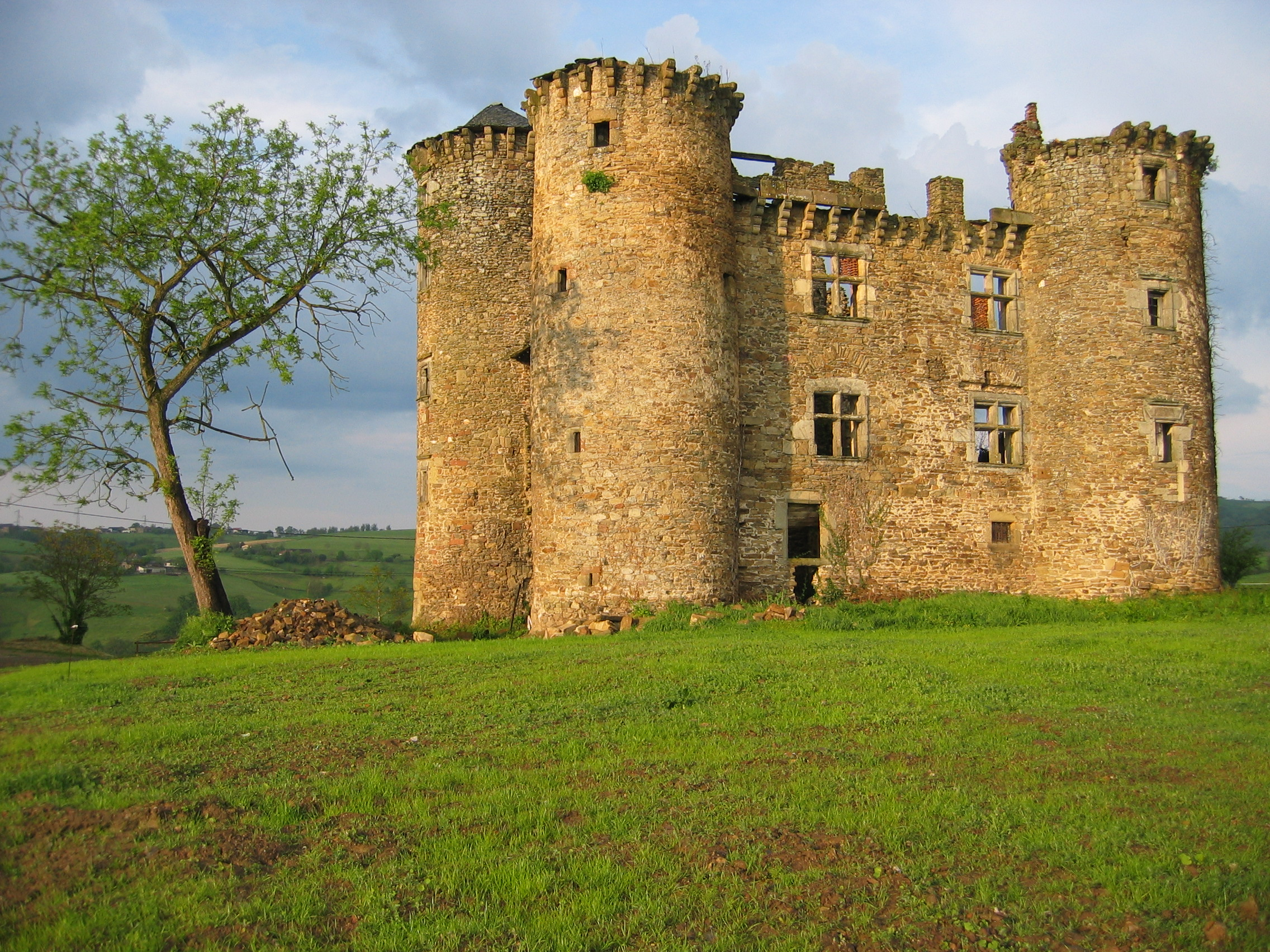 façade principale du château de Pagax